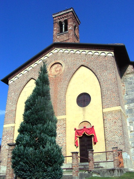 Sulbiate - Chiesa di S. Ambrogio